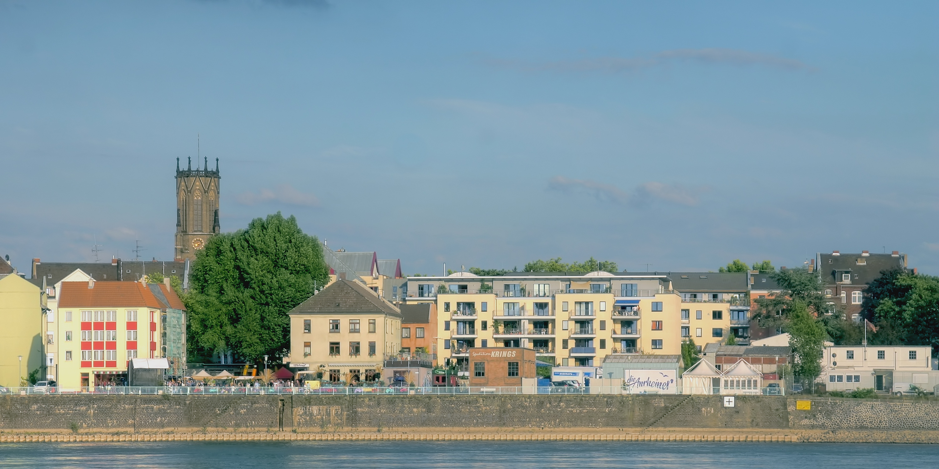 Filmgelände der WDR-Serie „Die Anrheiner“ in Köln-Mülheim von der gegenüberliegenden Rheinseite aus